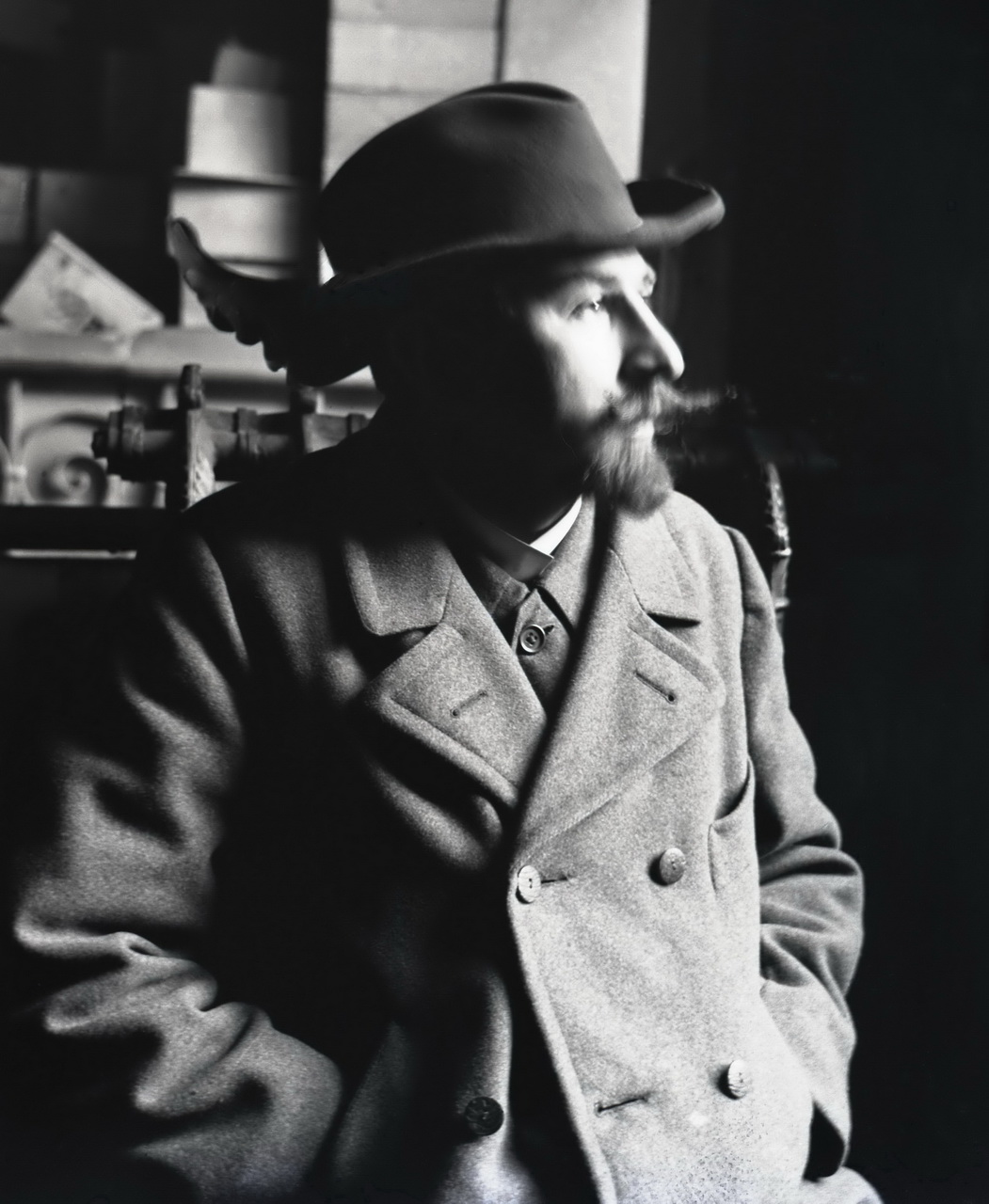 Ferdinand Pöschl (* 30. Mai 1877 in Landau an der Isar; † 7. Mai 1914) war ein bayerischer Fotograf aus Haimelkofen, Gemeinde Hofkirchen, heute Gemeinde Laberweinting im damaligen Landkreis Mallersdorf, heute Landkreis Straubing-Bogen. Das Bild wurde 2003 in Form einer kleinen, zerbrochenen Glasplatte aufgefunden, zusammengesetzt, gescannt und nachbearbeitet.